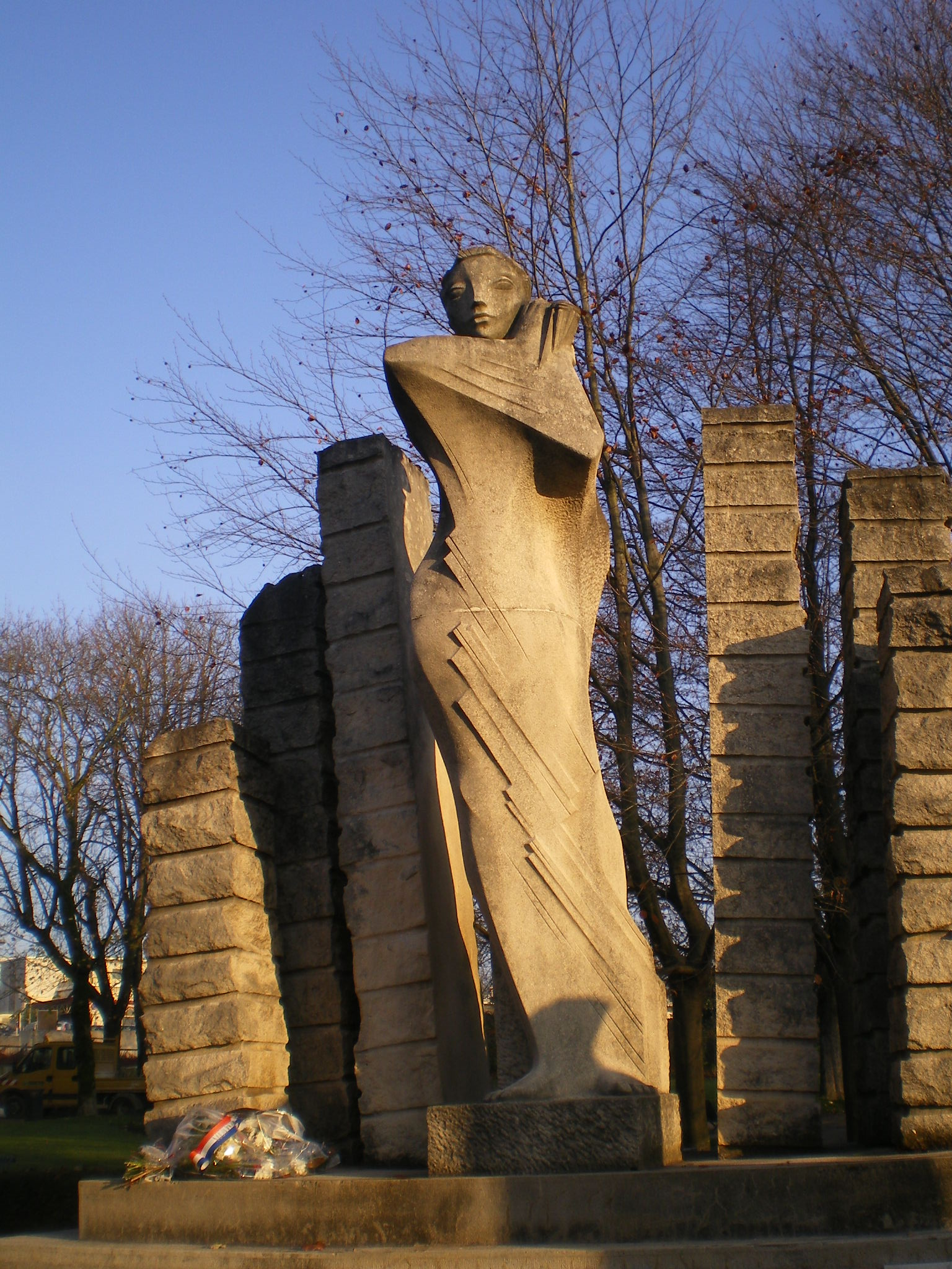 Mémorial